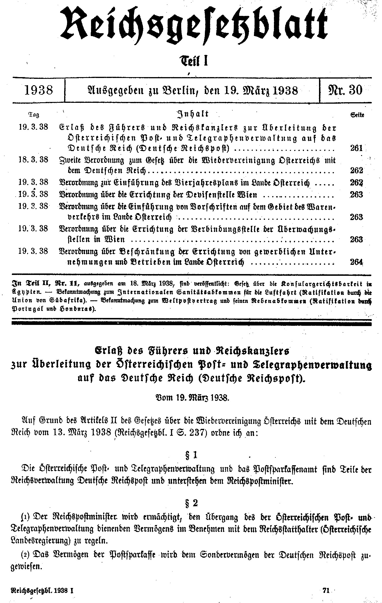 Eingliederung Österreichs ins Reich